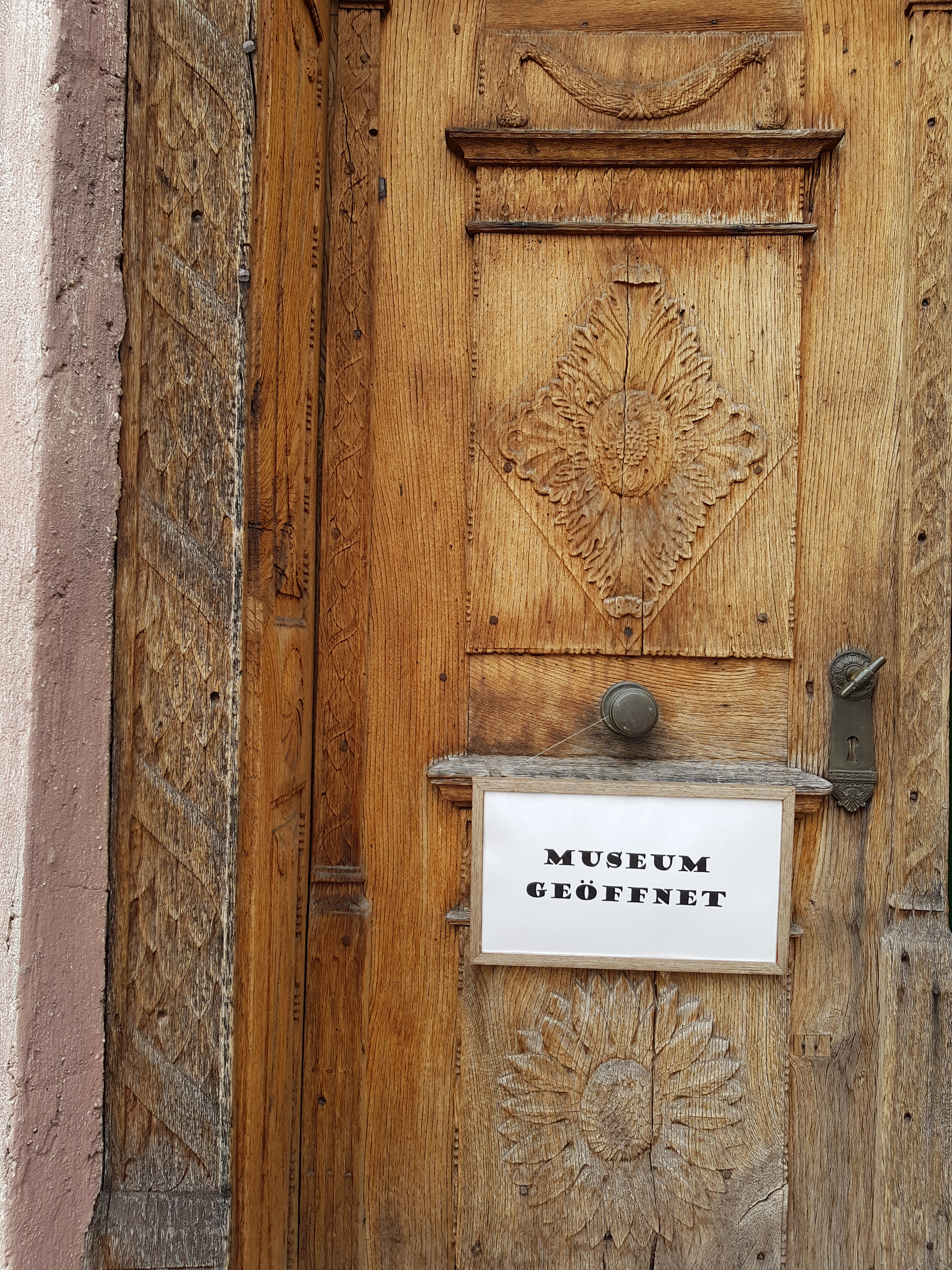 Detail zur hölzernen Eingangstür von 1837 im Heimatmuseum Prien, mit Schild Museum geöffnet